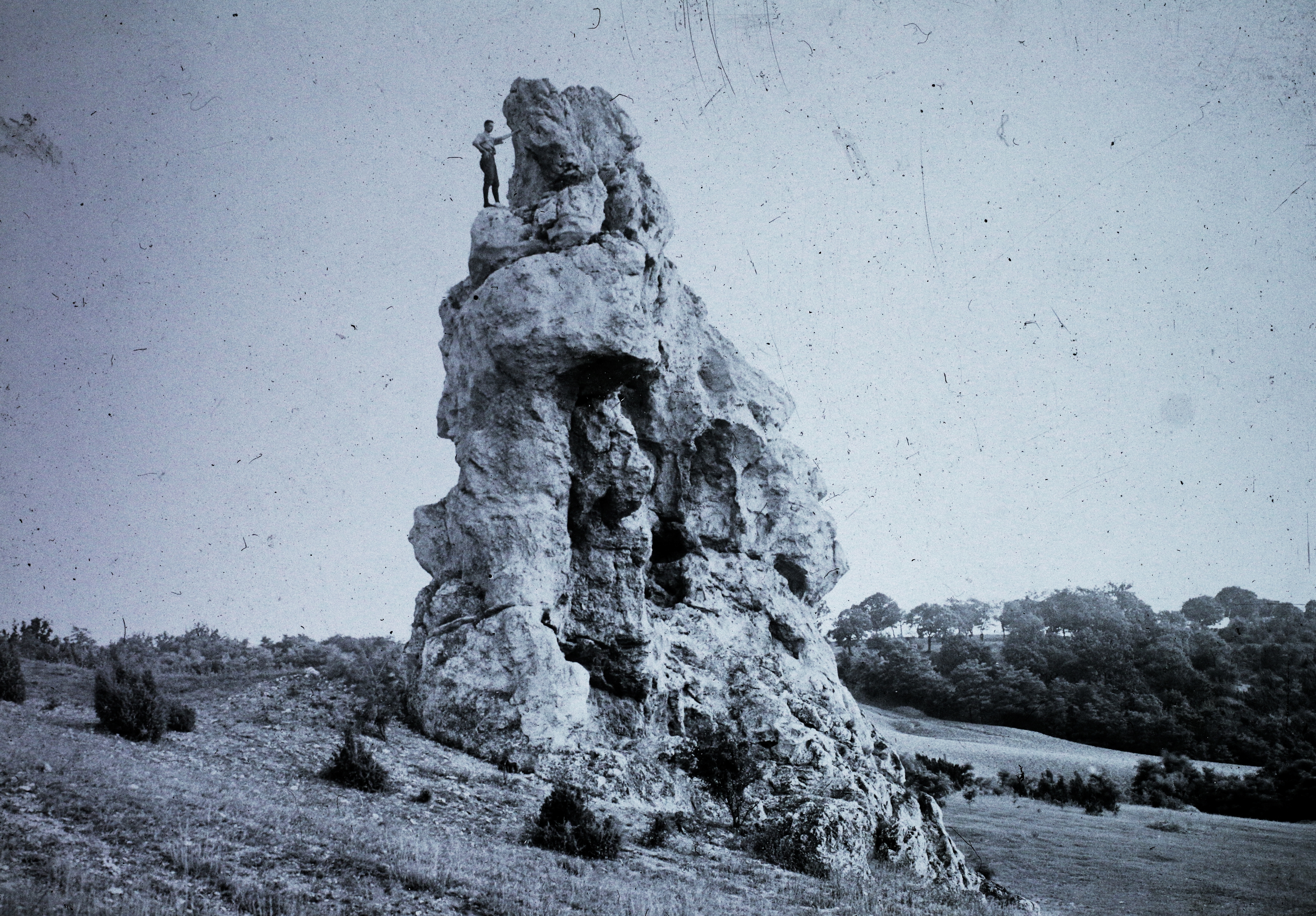 Ördögoltár. Location: Hungary, Pilis Mountains Title: Ördögoltár.